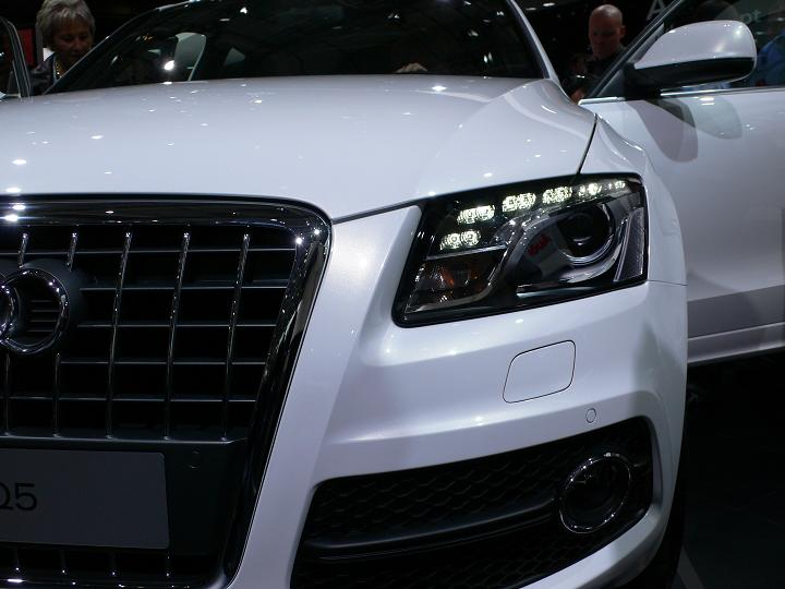 Audi Q5 au Mondial de l'automobile de Paris - Édition 2008